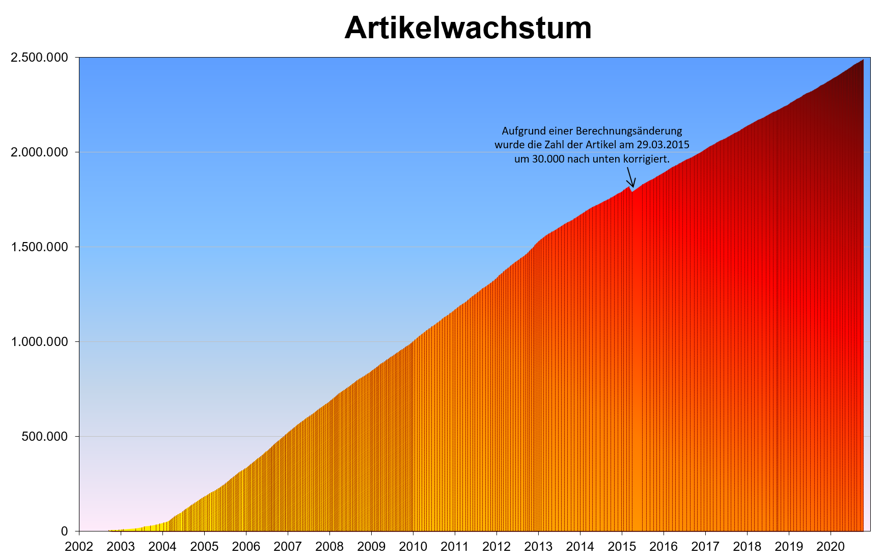 Zahl der Artikel in dewiki